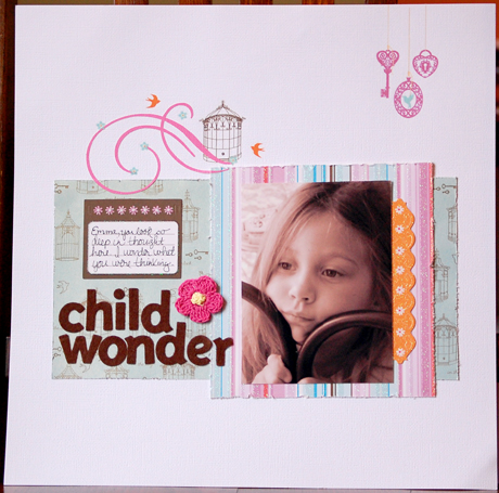 SEI paper